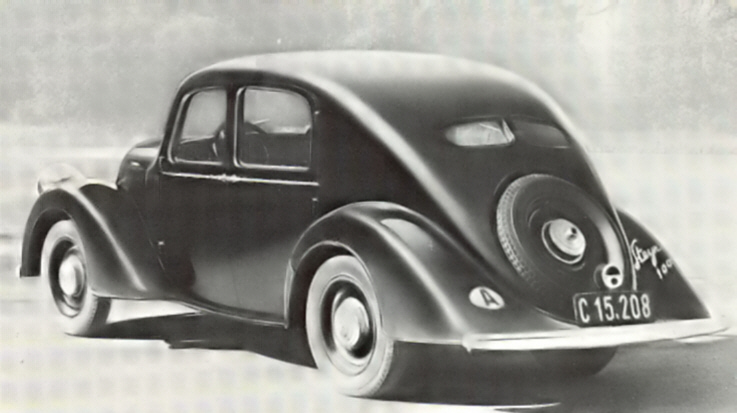 Steyr 100 Saloon 4 doors (1935)